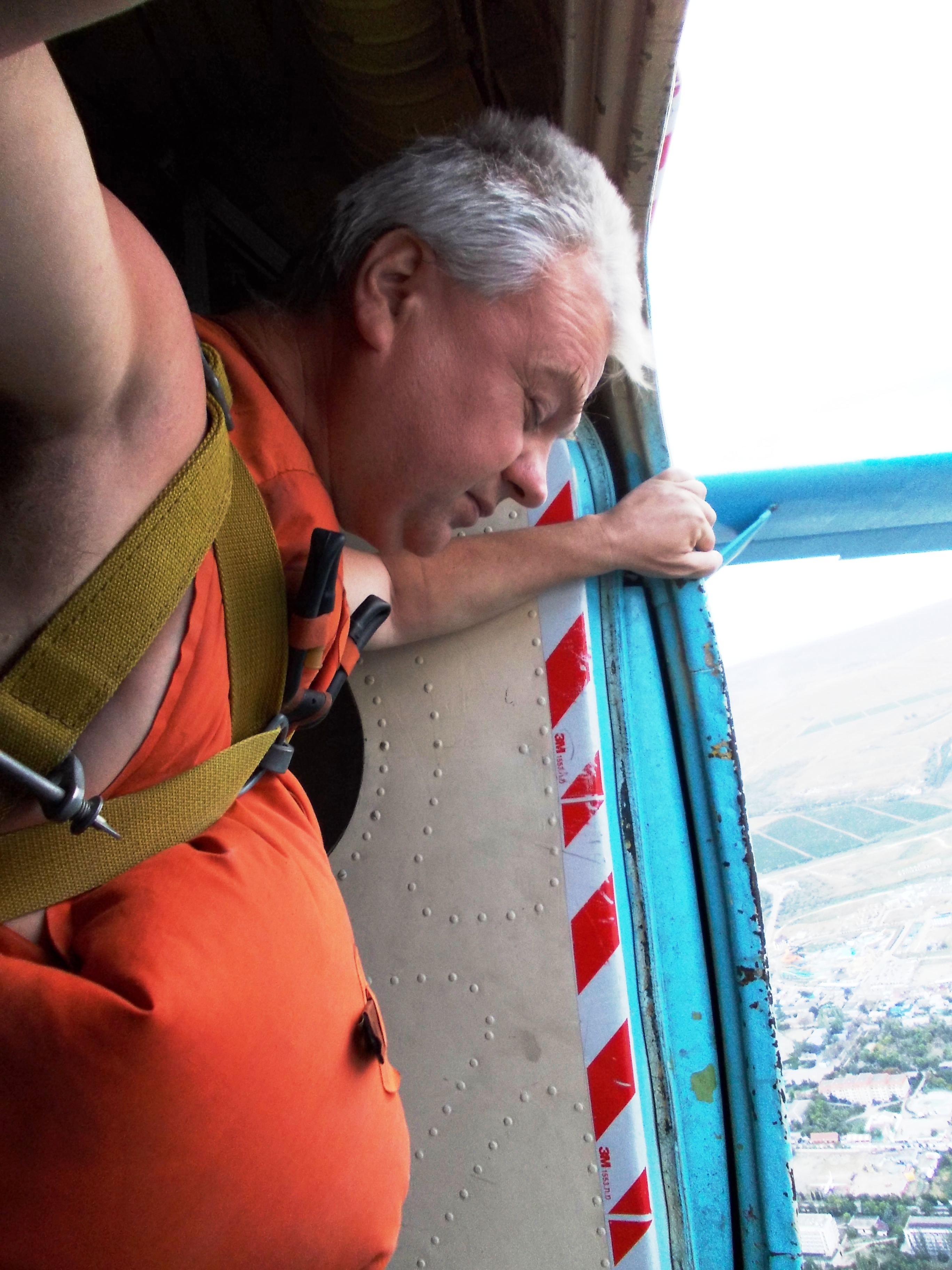 24 серпня 2011 року, вперше в світовій історії, незрячі парашутисти стрибнули на морську воду самостійно, без інструктора, на точність приводнення (м. Коктебель, АР Крим, Україна). Одним з них був В. Б. Петровський